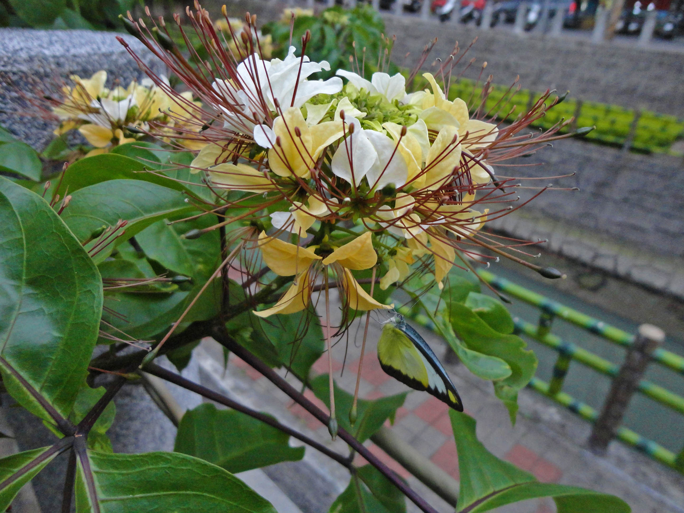 新北市中和區廟仔尾溝近福祥橋栽植的台灣魚木盛開 花上還可以見到幼蟲期攝食台灣魚木葉片的台灣粉蝶